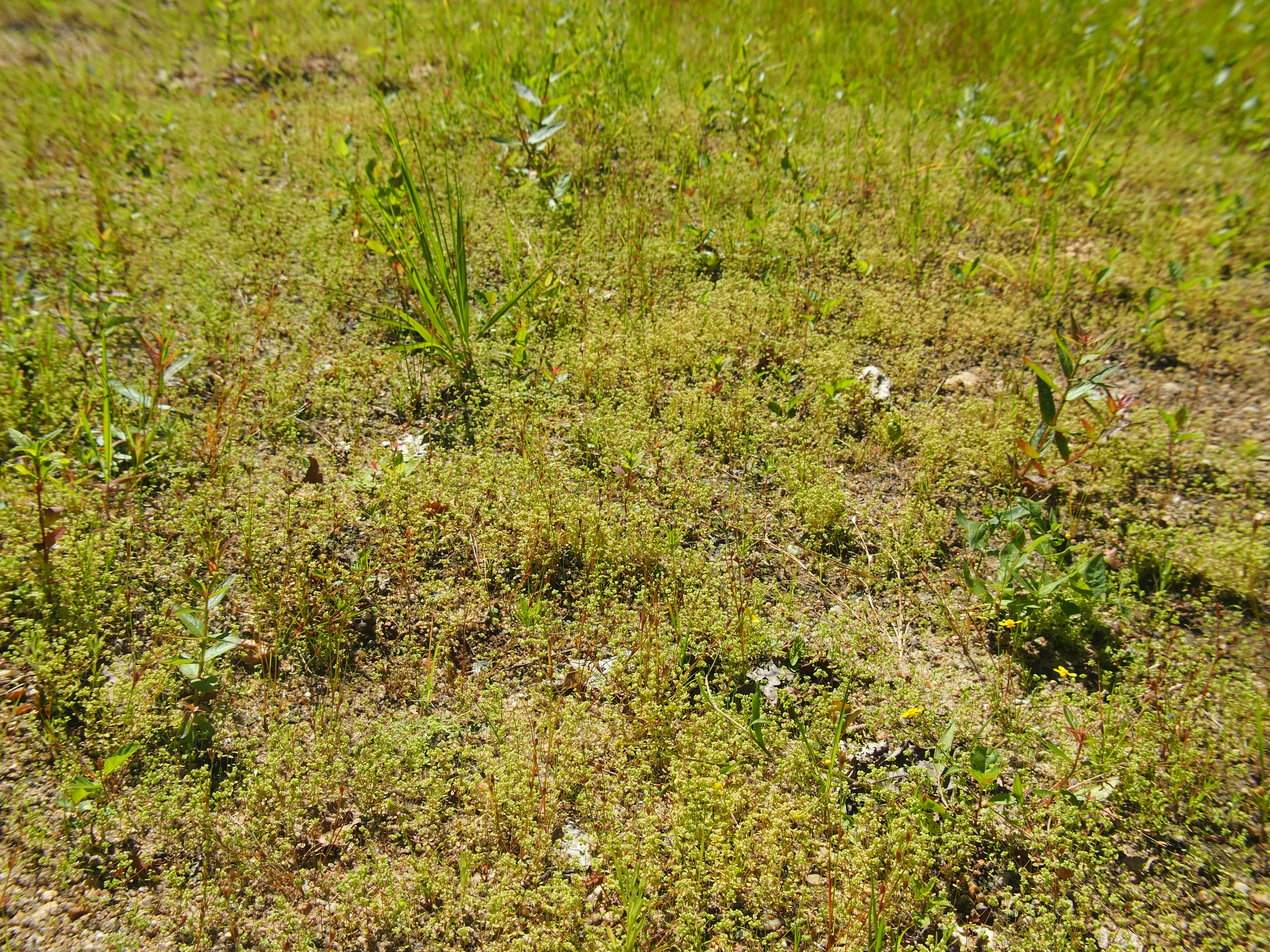 Üppiger Bestand an Zwerglein im Naturpark Südheide, Niedersachsen, Germany